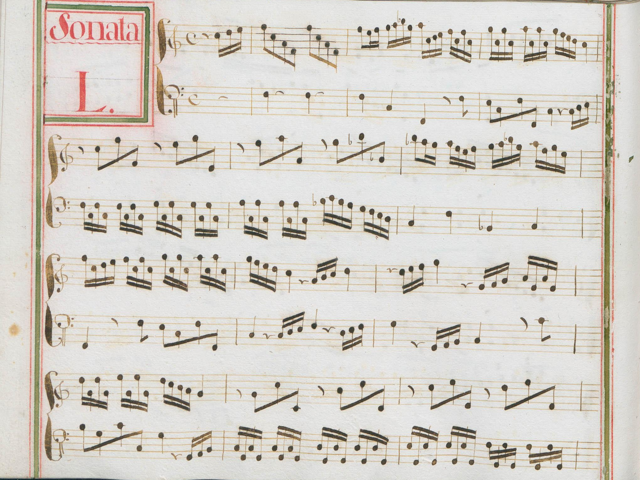 La sonate K. 85, telle qu'elle se présente dans le manuscrit de Venise, volume XIV no. 50.